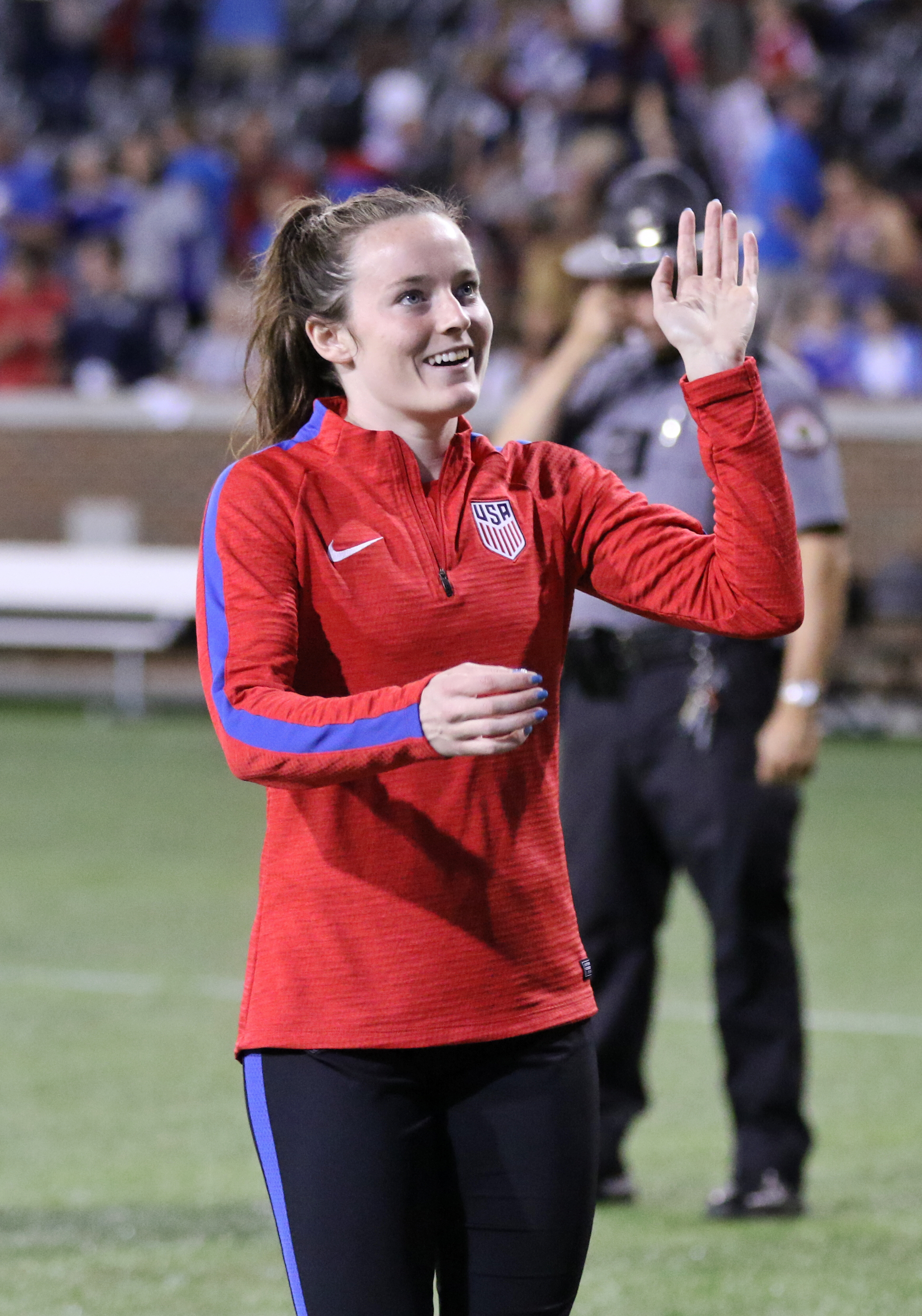 RoseLavelle